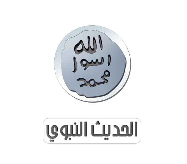 شعار المجد للحديث النبوي